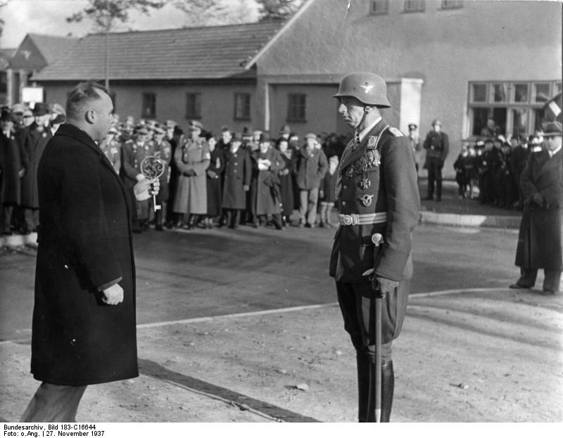 Werneuchen, Schlüsselübergabe Theo Osterkamp Eine Kleinstadt [Werneuchen] wird Garnison Draussen vor dem Kasernentor erfolgt die Schlüsselübergabe durch den Bauherrn (Markhof) an den Kommandanten (Oberstltnt. Osterkamp). Fot.: Nau 27.11.37 [Werneuchen.- rechts Oberstleutnant Theodor Osterkamp] Abgebildete Personen: Osterkamp, Theodor: Generalmajor, Ritterkreuz (RK), Luftwaffe, Orden Pour le mérite, Deutschland (GND 124745822)